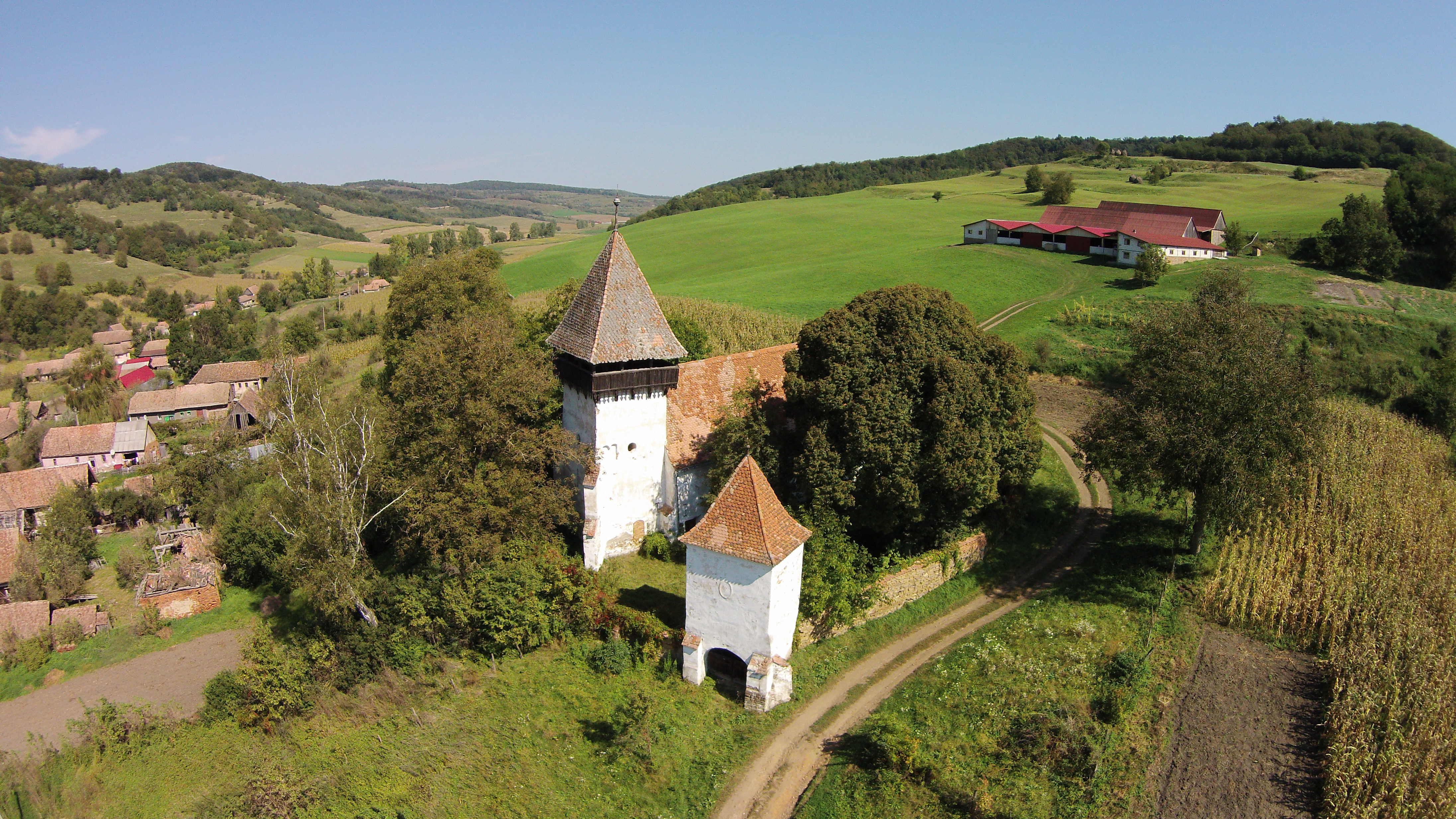 Ansamblul bisericii evanghelice